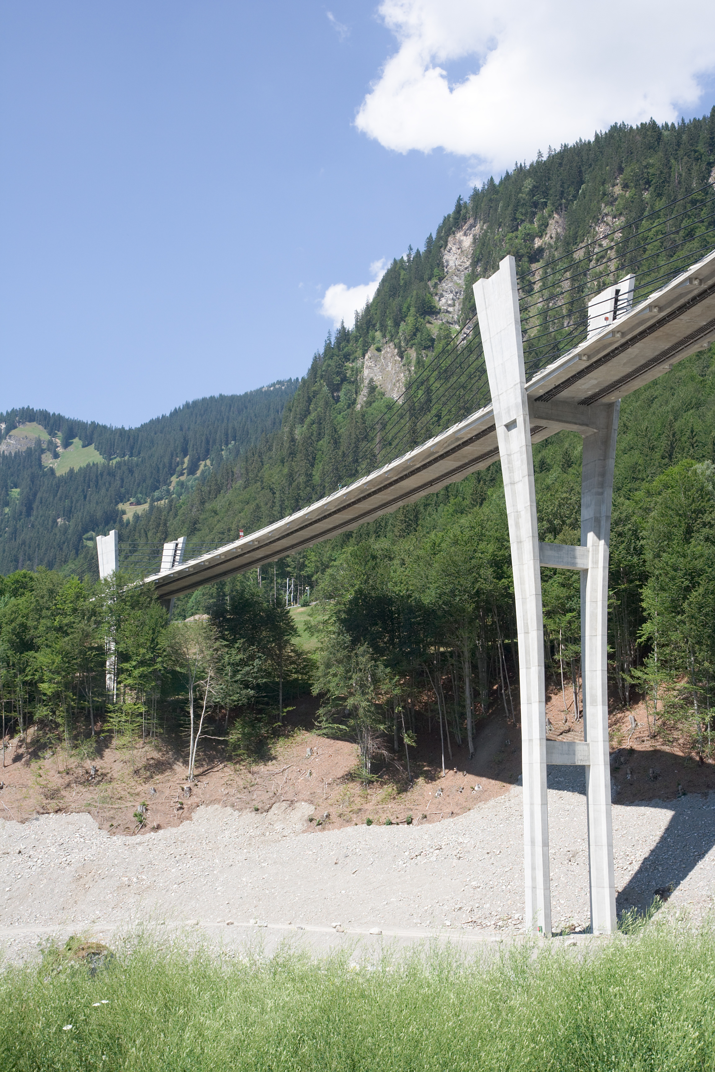 Die Sunnibergbrücke in Klosters-Serneus, Schweiz von unten